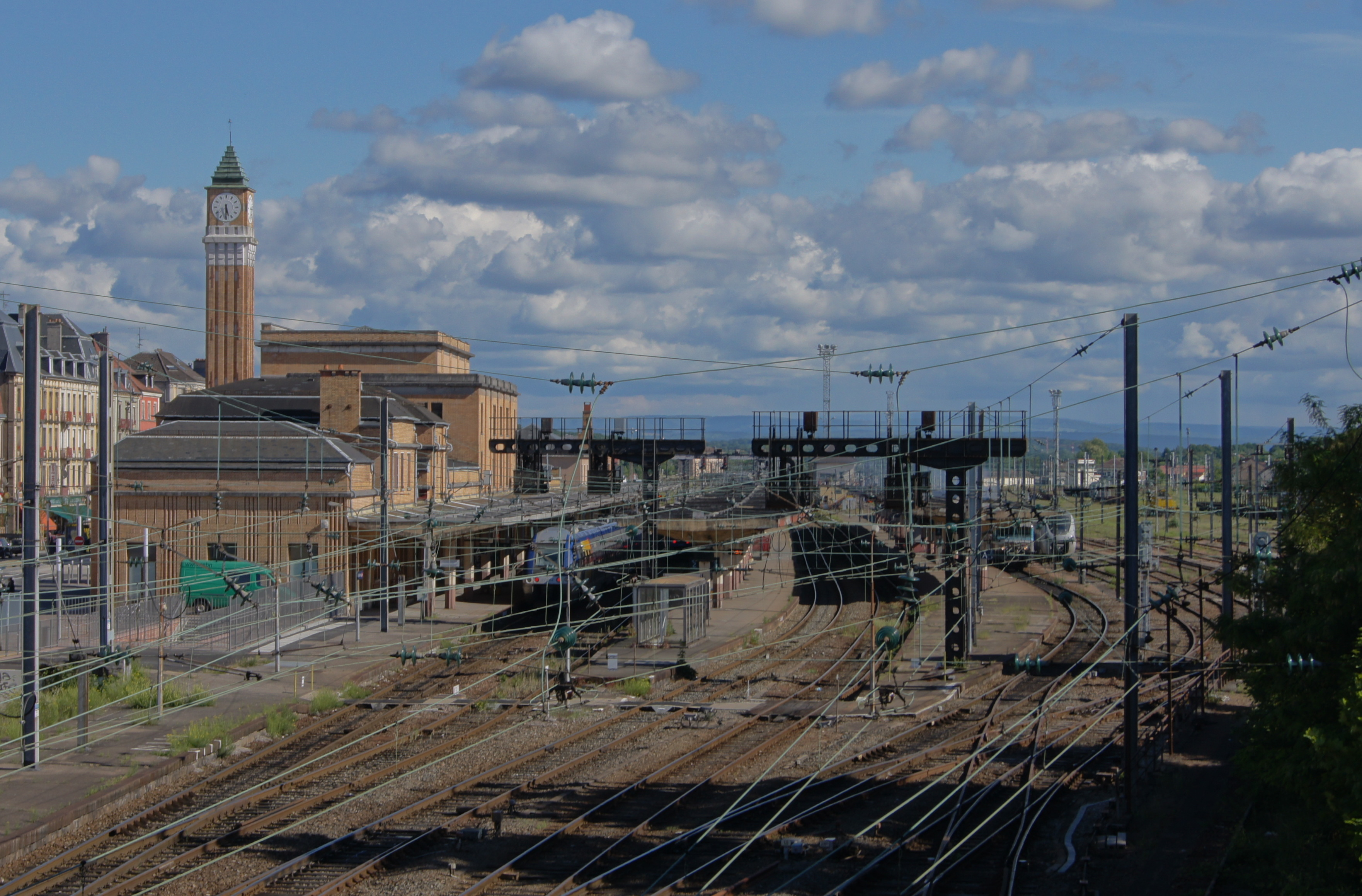 La gare de Belfort-Ville, vue depuis Pont Michelet, vers le Sud. Sur voie 1, navette pour Mulhouse. Sur voie 2, autorail en partance pour Épinal. Sur voie 5, train en attente de départ pour Paris-Est. Sur la voie plus à droite, rame d'essai Alstom Regiolis